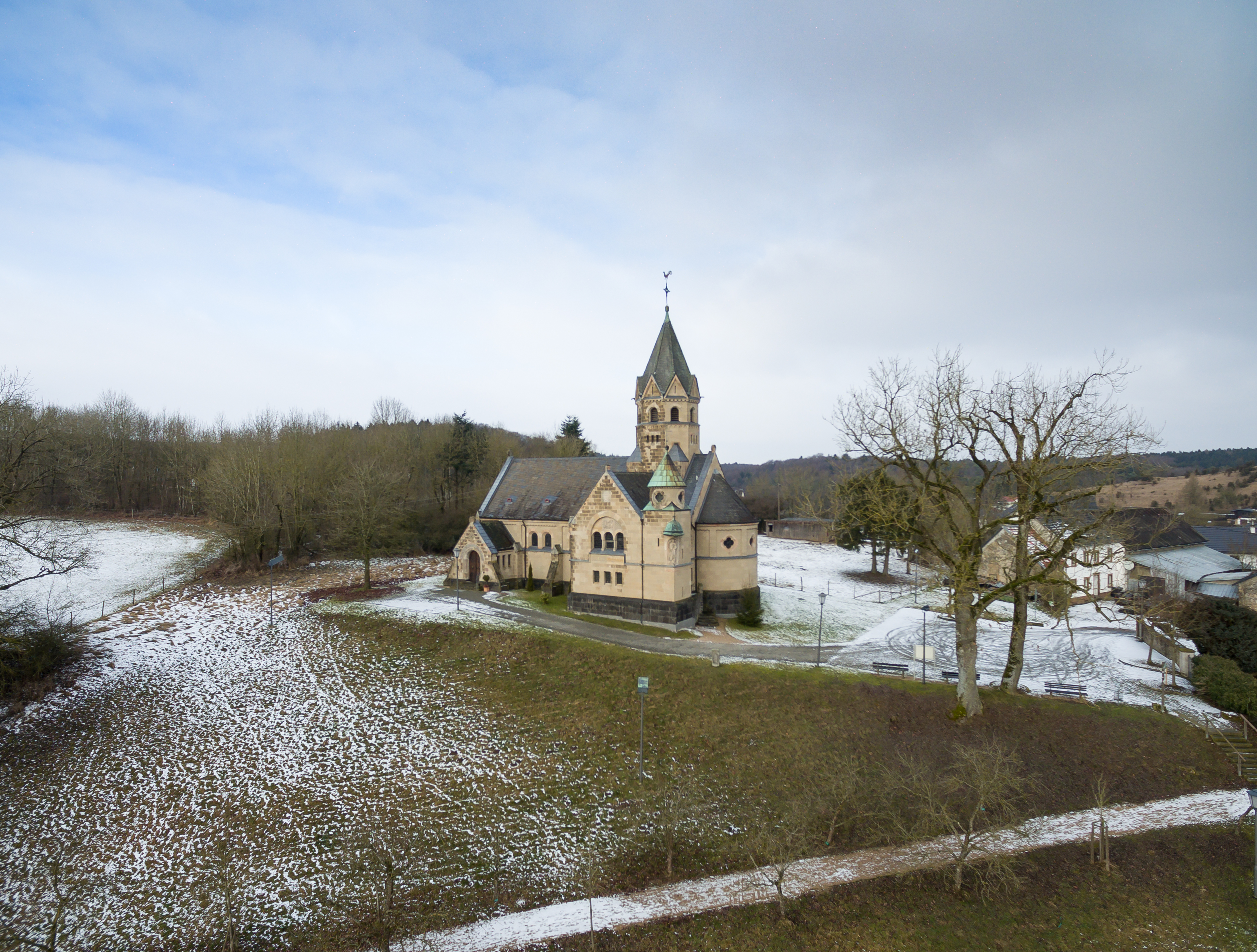 Erlöserkirche Mirbach, Eifel